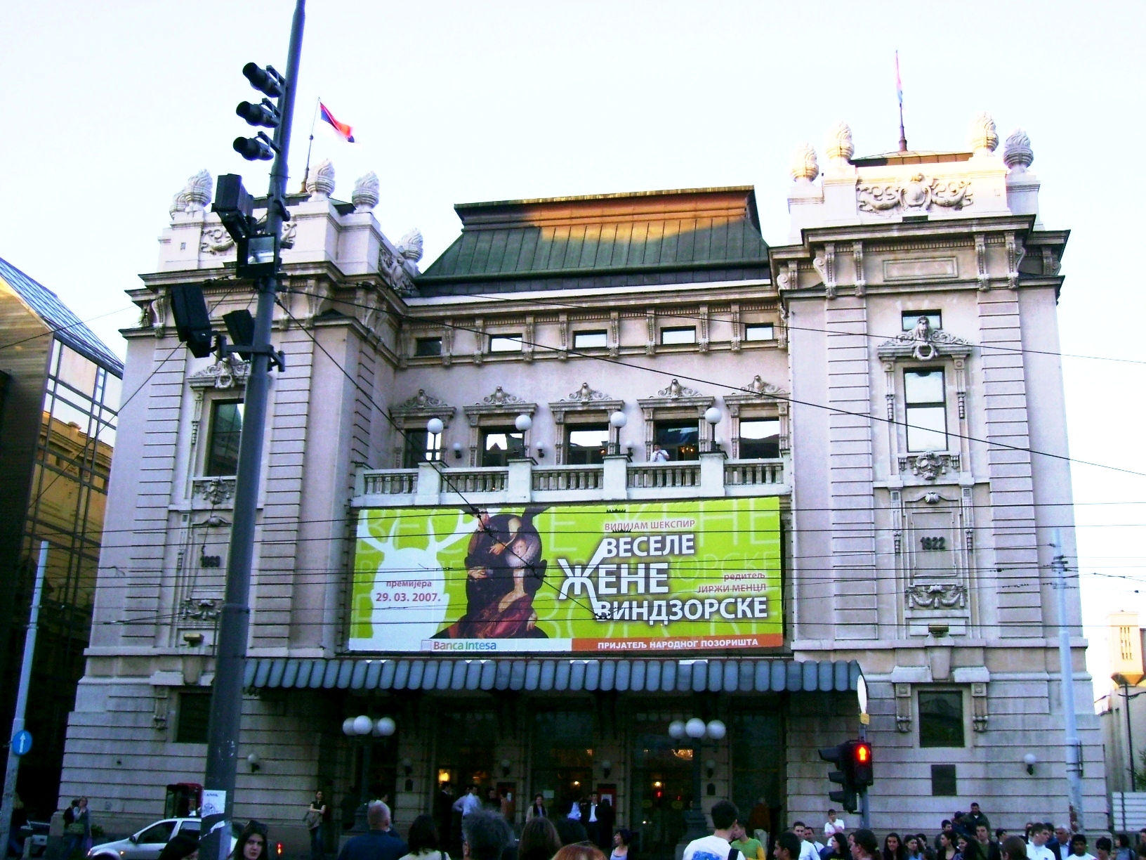 National theatre in Belgrade / Narodno pozoriste u Beogradu